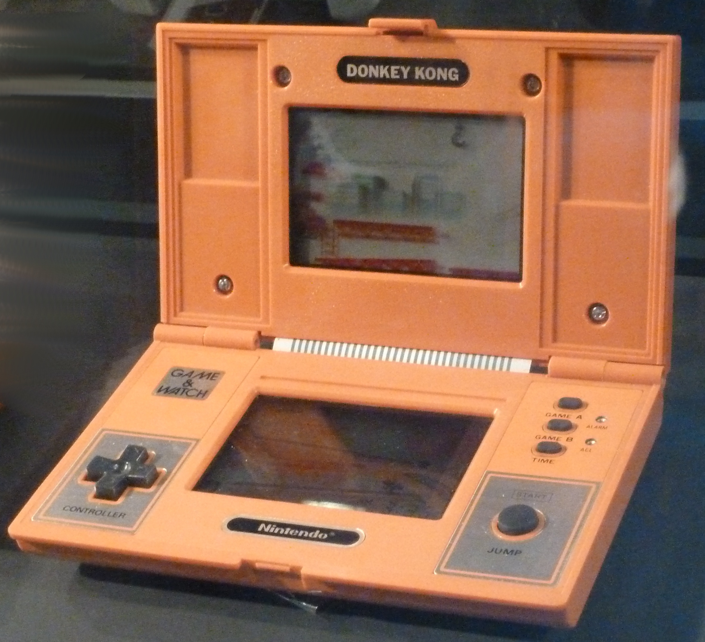 Console Game & Watch Donkey Kong présentée au Festival du Jeu Vidéo par le musée du jeu vidéo